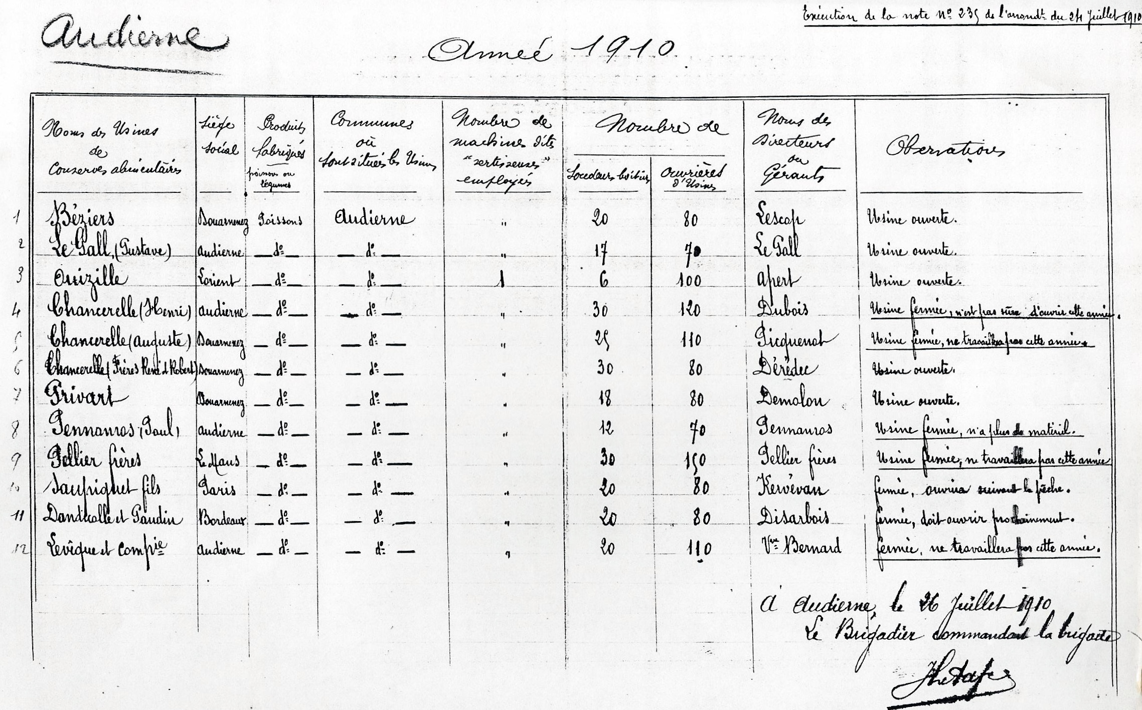 Audierne : état des conserveries en 1910 (Archives de l'Equipement du département du Finistère, subdivision de Quimper).